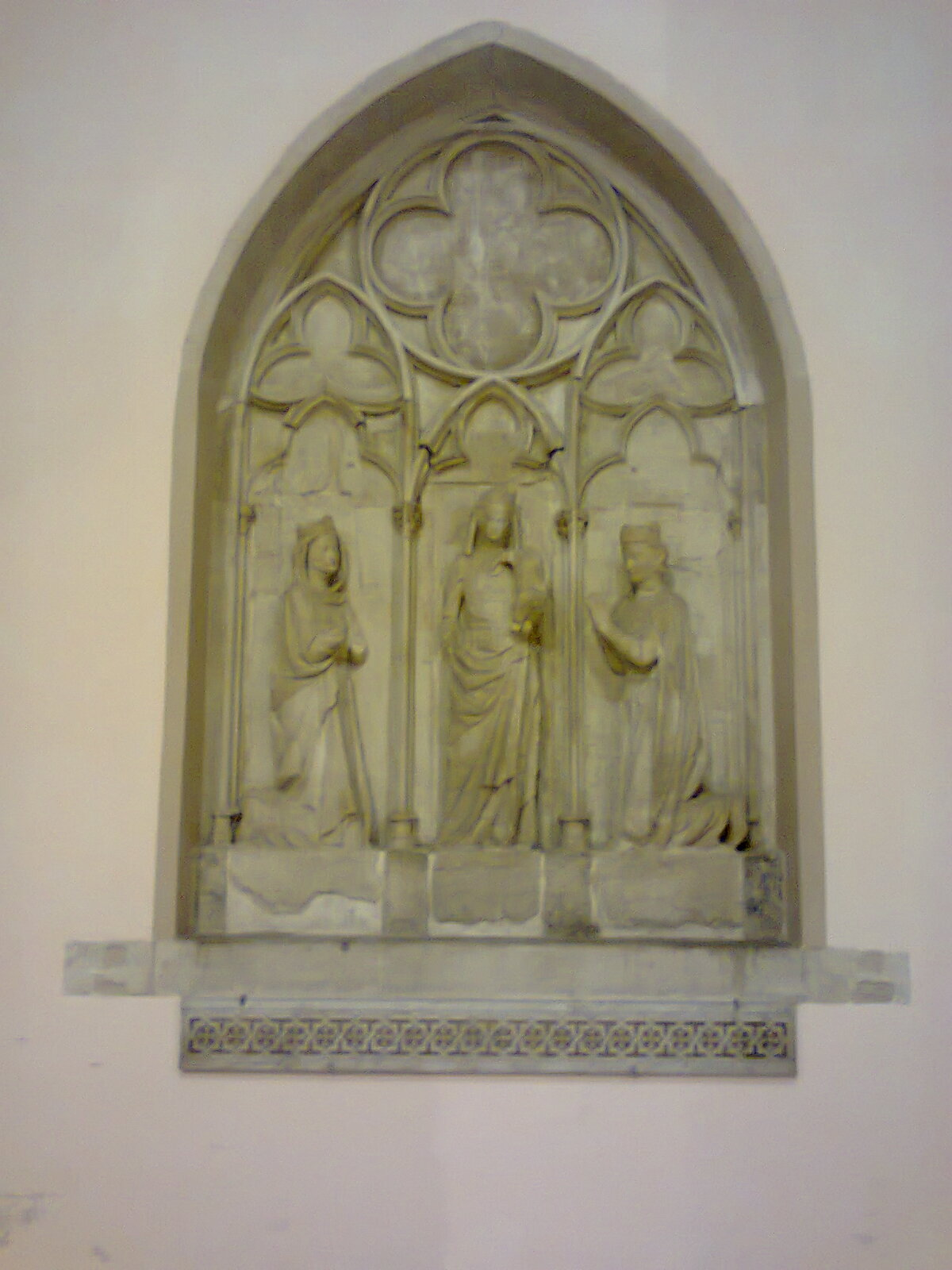 Autore Alfredo ledonne, foto scattata personalmente l'8 dicembre 2012, voglio che chiunque usi la foto mi riconosca come autore riportando il nome che ho indicato e che mantenga la stessa licenza per le opere derivate.